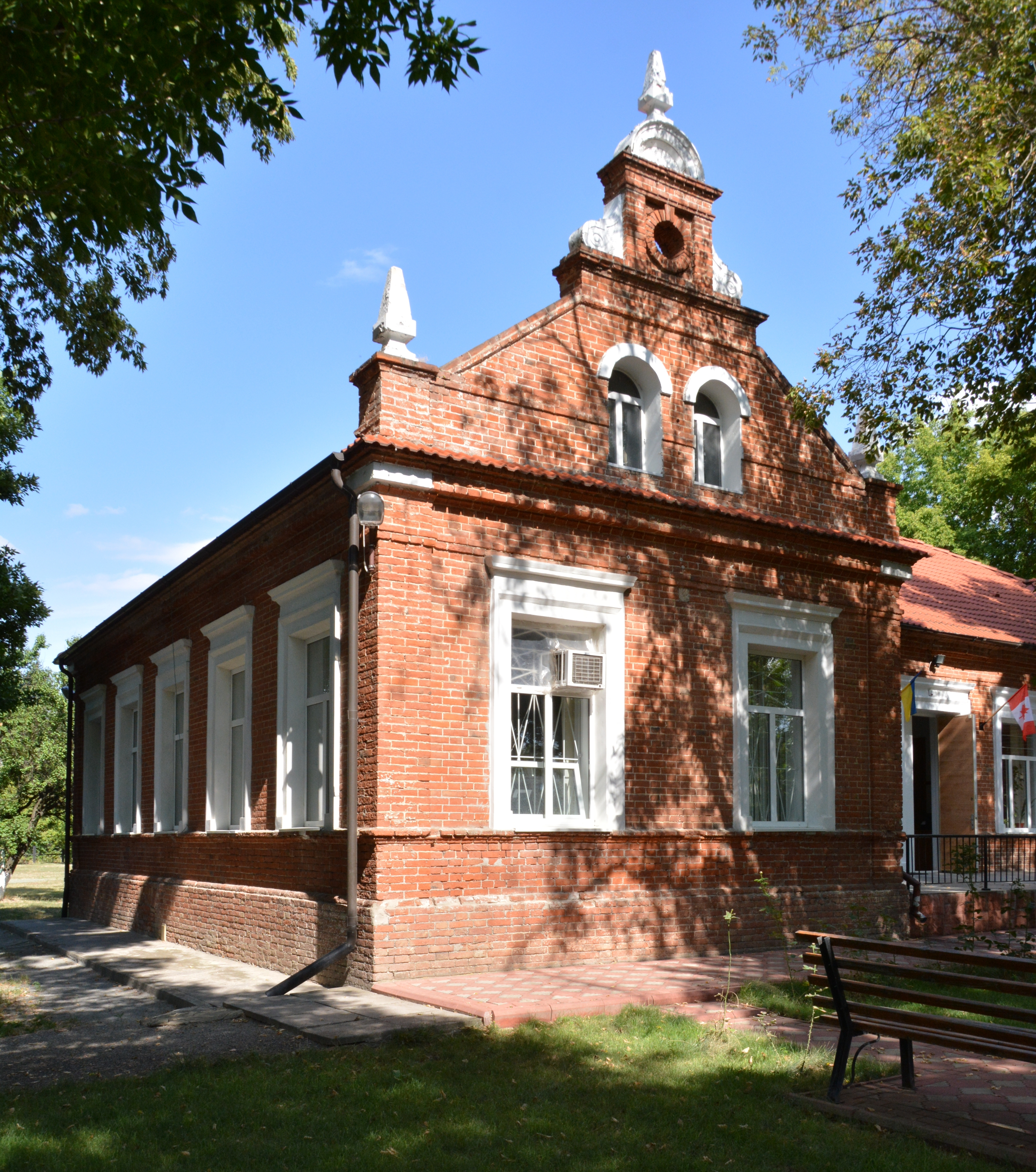 Приватна жіноча гімназія, Молочанськ